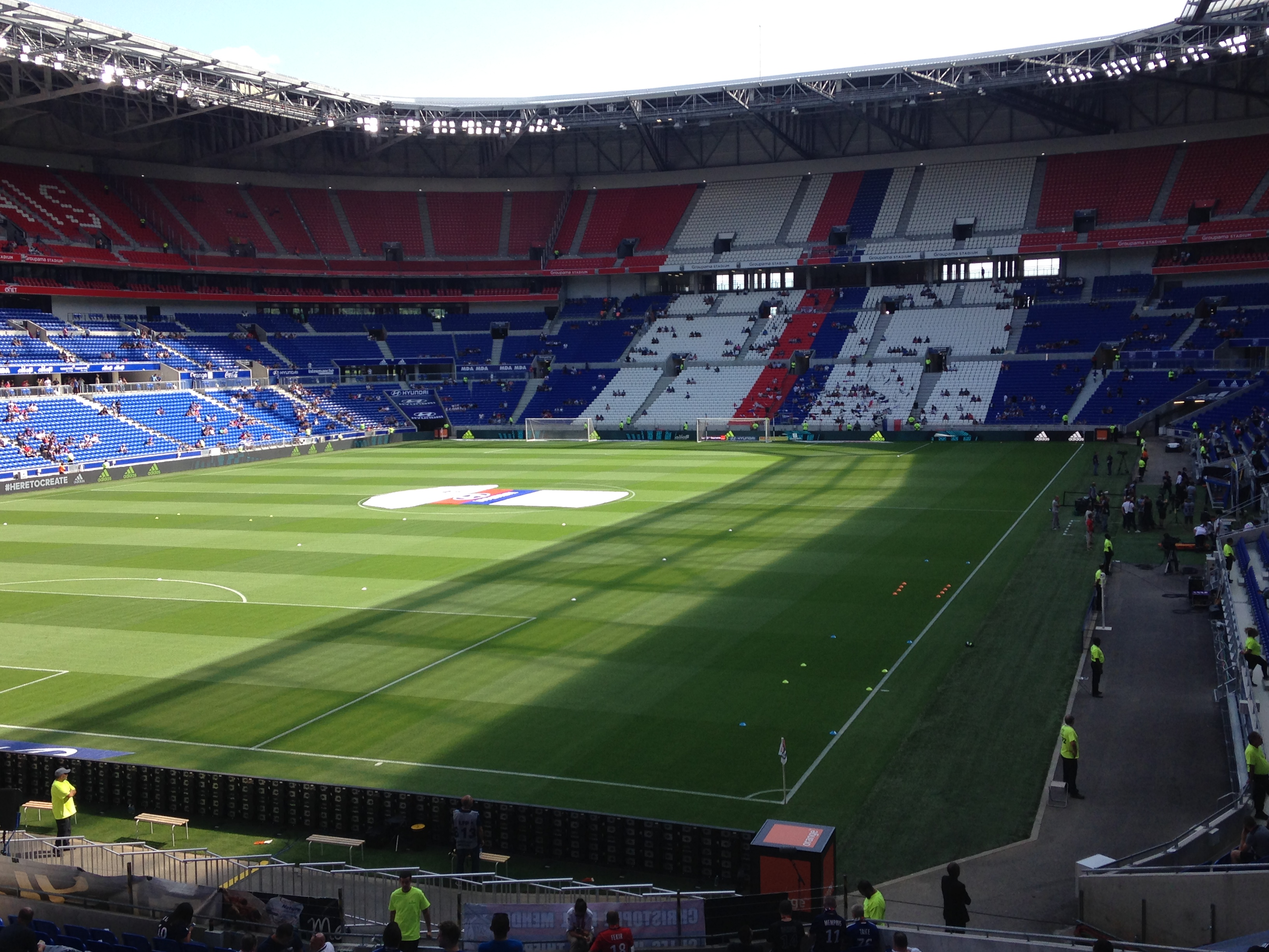 Parc ol